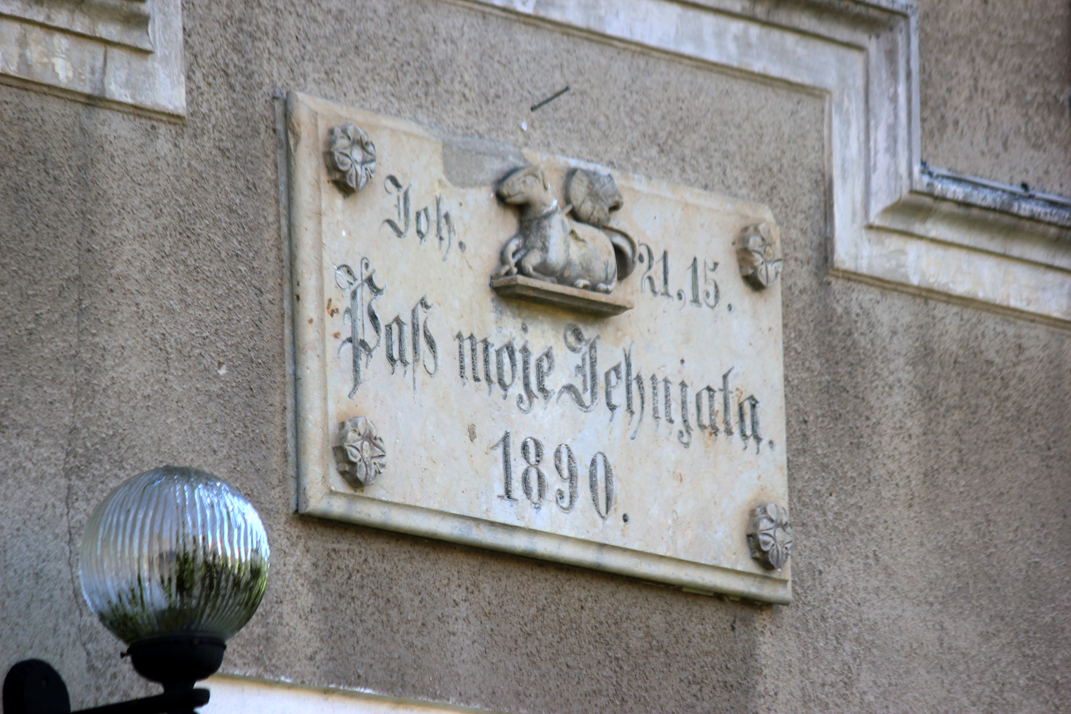 Hornjoserbsce: Serbski napis nad durjemi něhdyšeje šule w Trušecach, wjesnym dźělu Nosaćic.